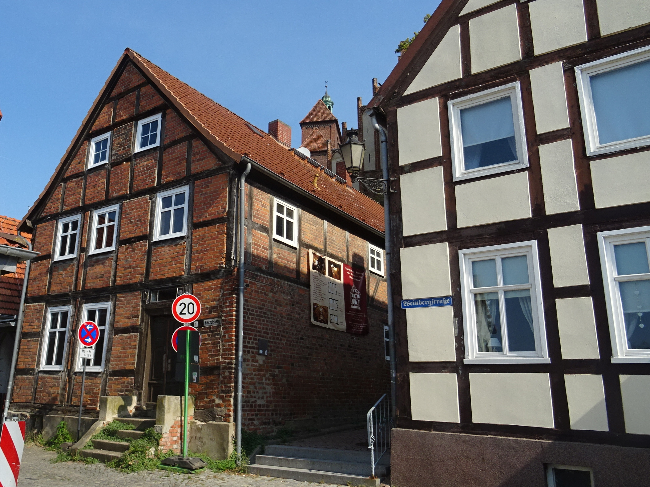 Havelberg, denkmalgeschütztes Wohnhaus Bischofsberg 1